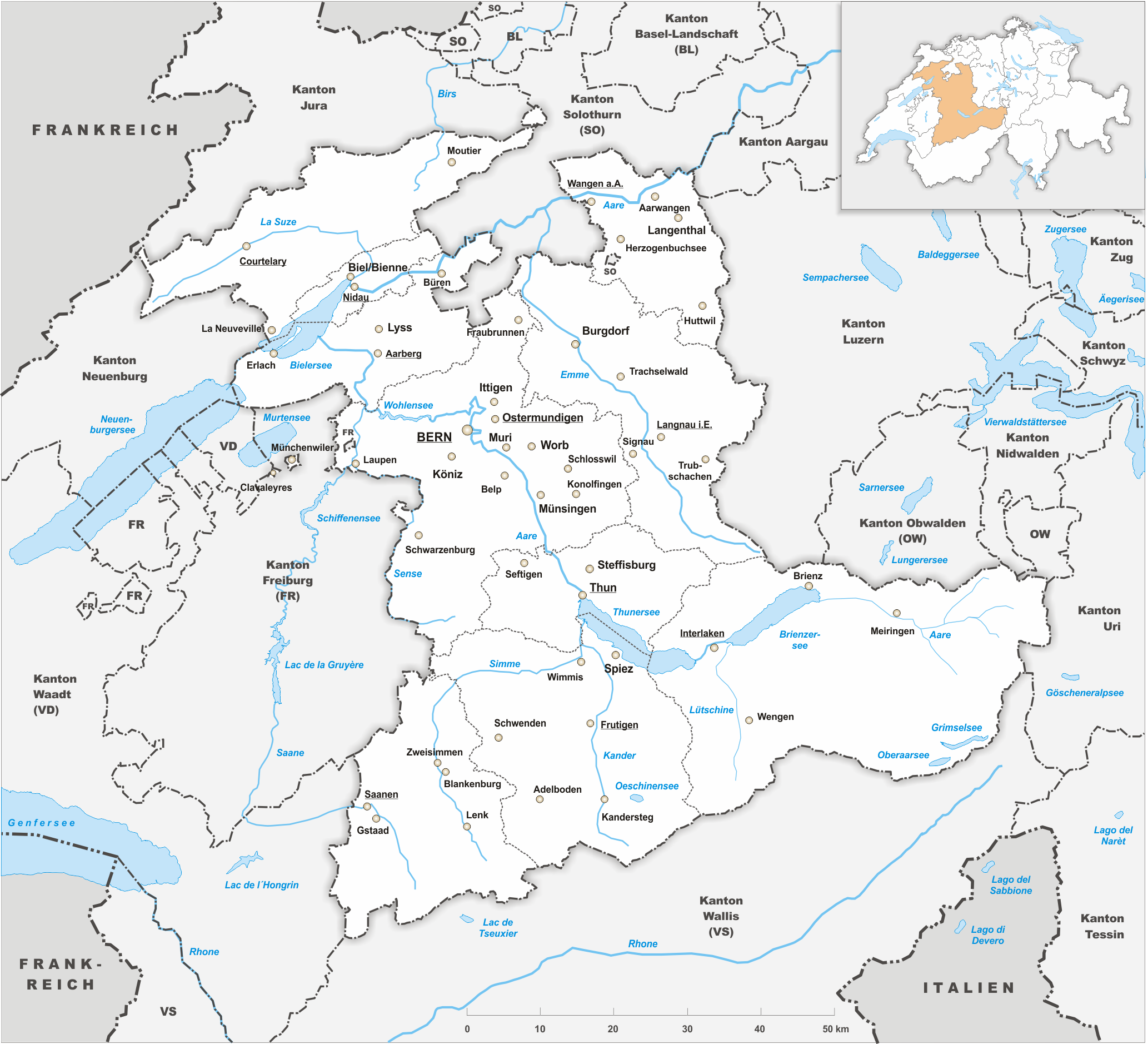 Karte des Kanton Bern.